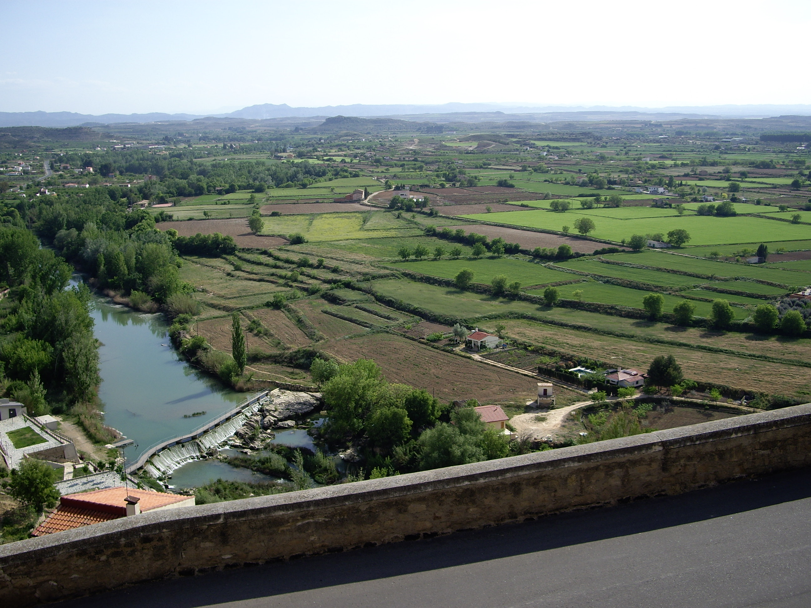 la rivière guadalope vue depuis Alcaniz, avril 2006